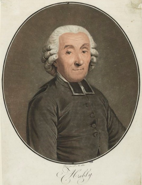 Estampe de Gabriel Bonnot de Mably, musée de la Révolution française, Vizille.